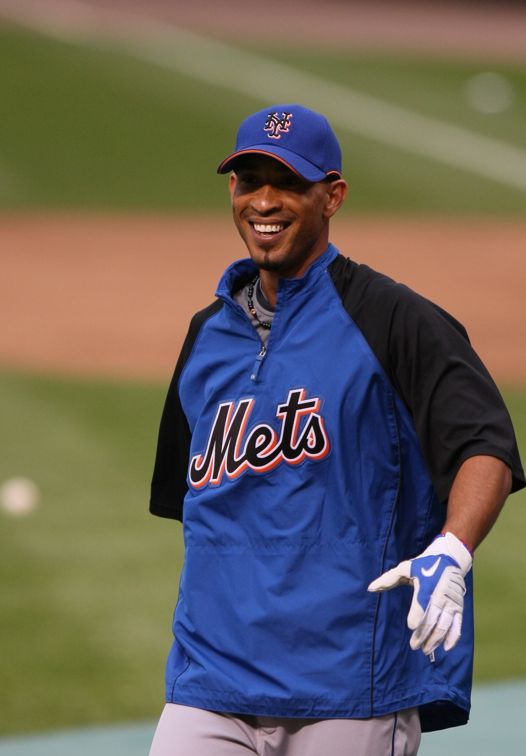 Wilson Valdéz